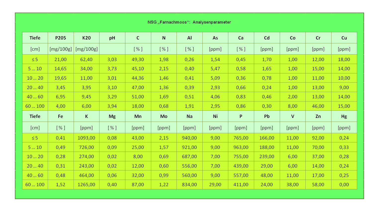 Österreich - Vorarlberg - Bezirk Bregenz - Alberschwende/Bildstein: Naturschutgebiete Farnachmoos, Analysewerte